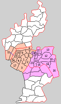 福岡県山門郡の町村制時点の町村。